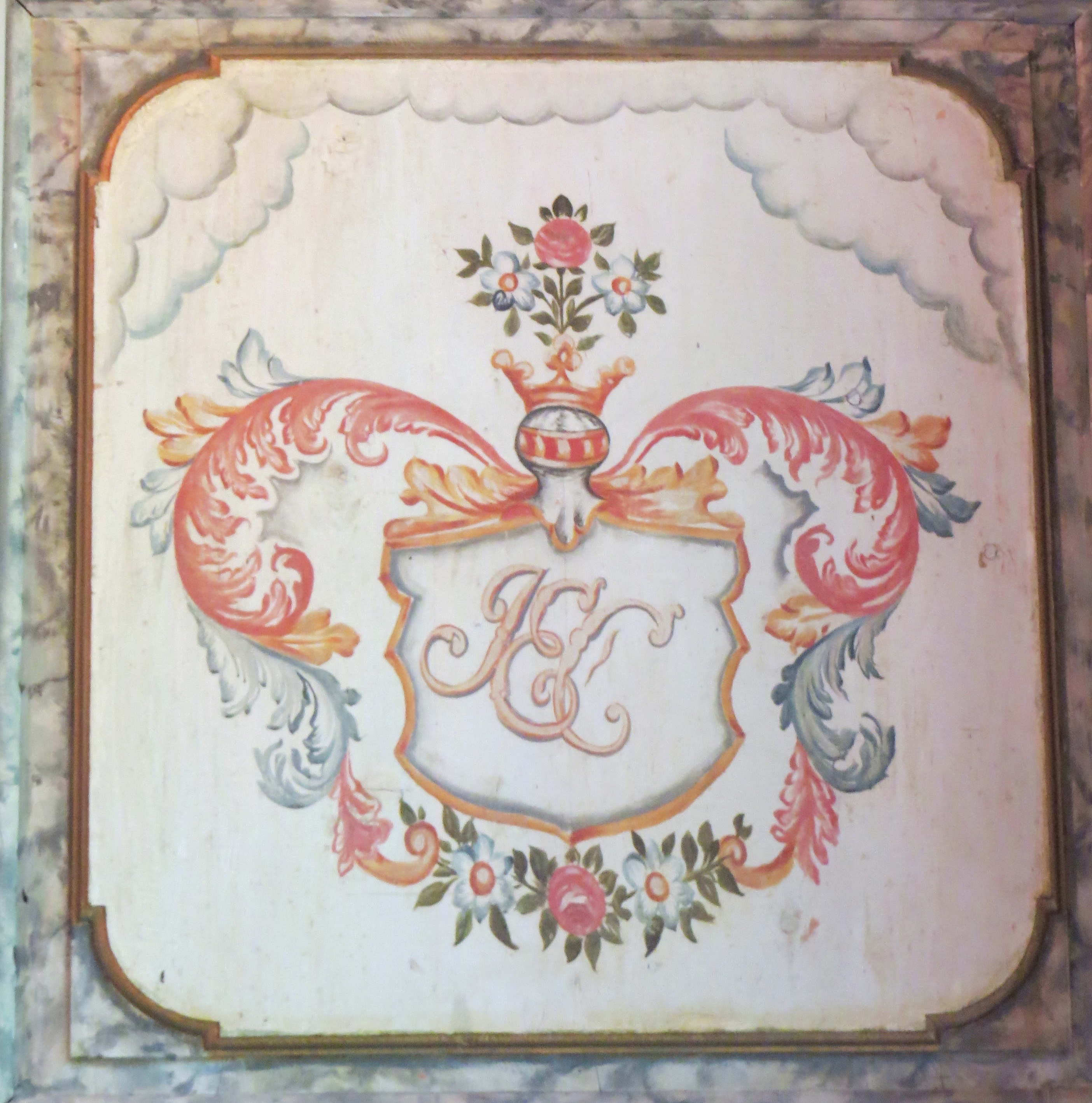 Initialer tihørende Juliane Ernestine de Cicignon (1744—1799), Solum Kirke, Skien. Se: Hans Cappelen: «Talende våpenskjold», Varden 2.7.1966